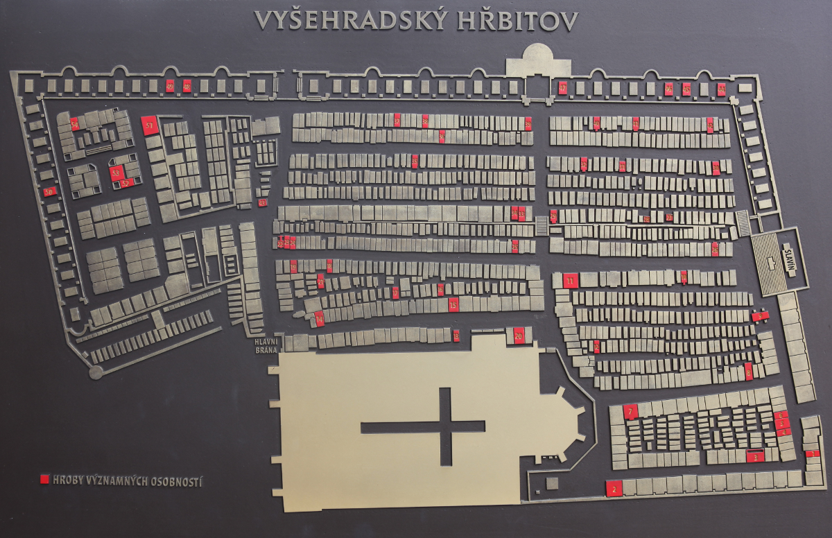 plan des défunts